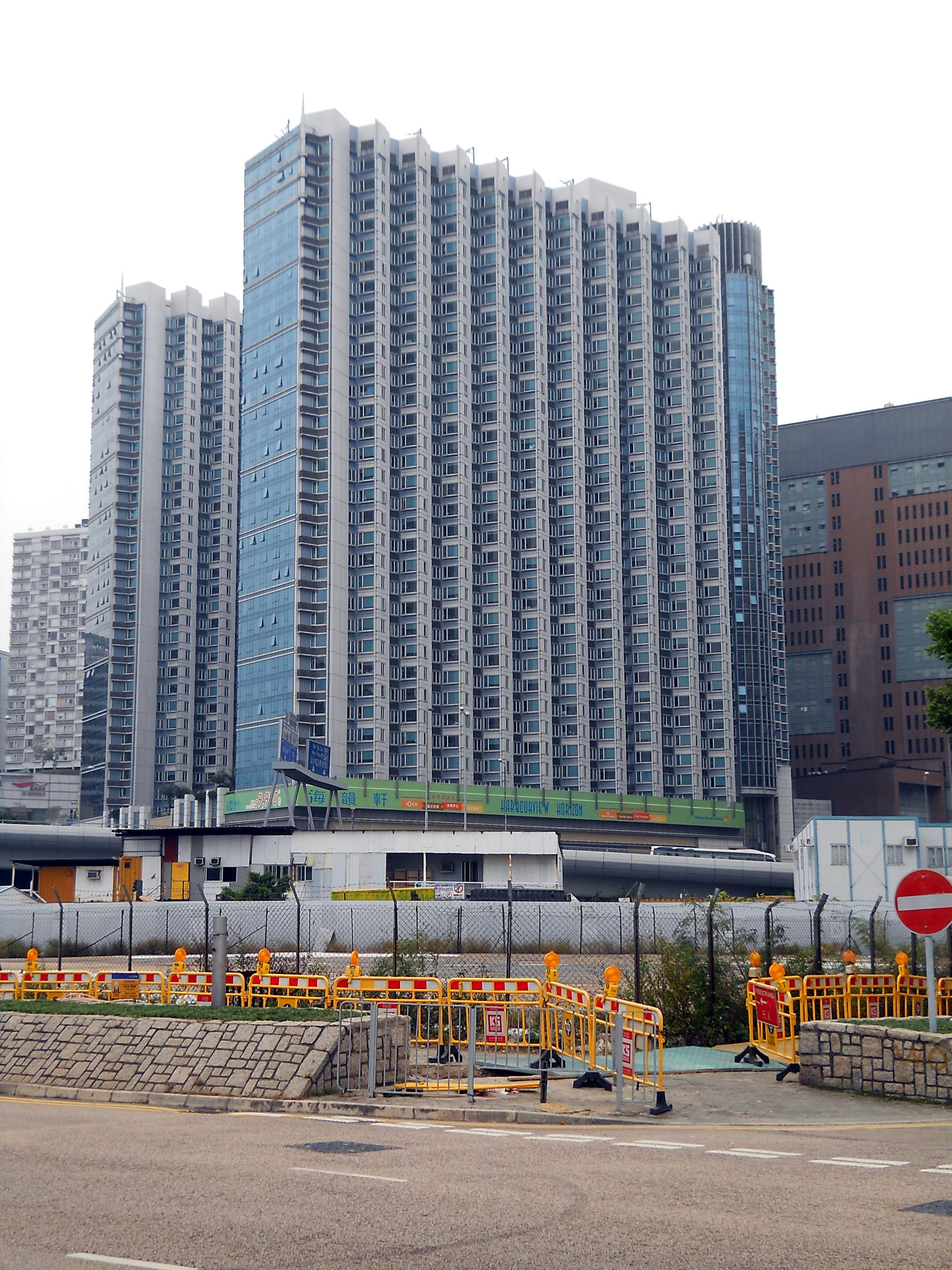 中文（香港）: 海韻軒